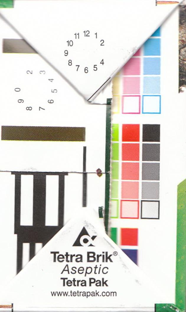 Нижняя поверхность асептической упаковки